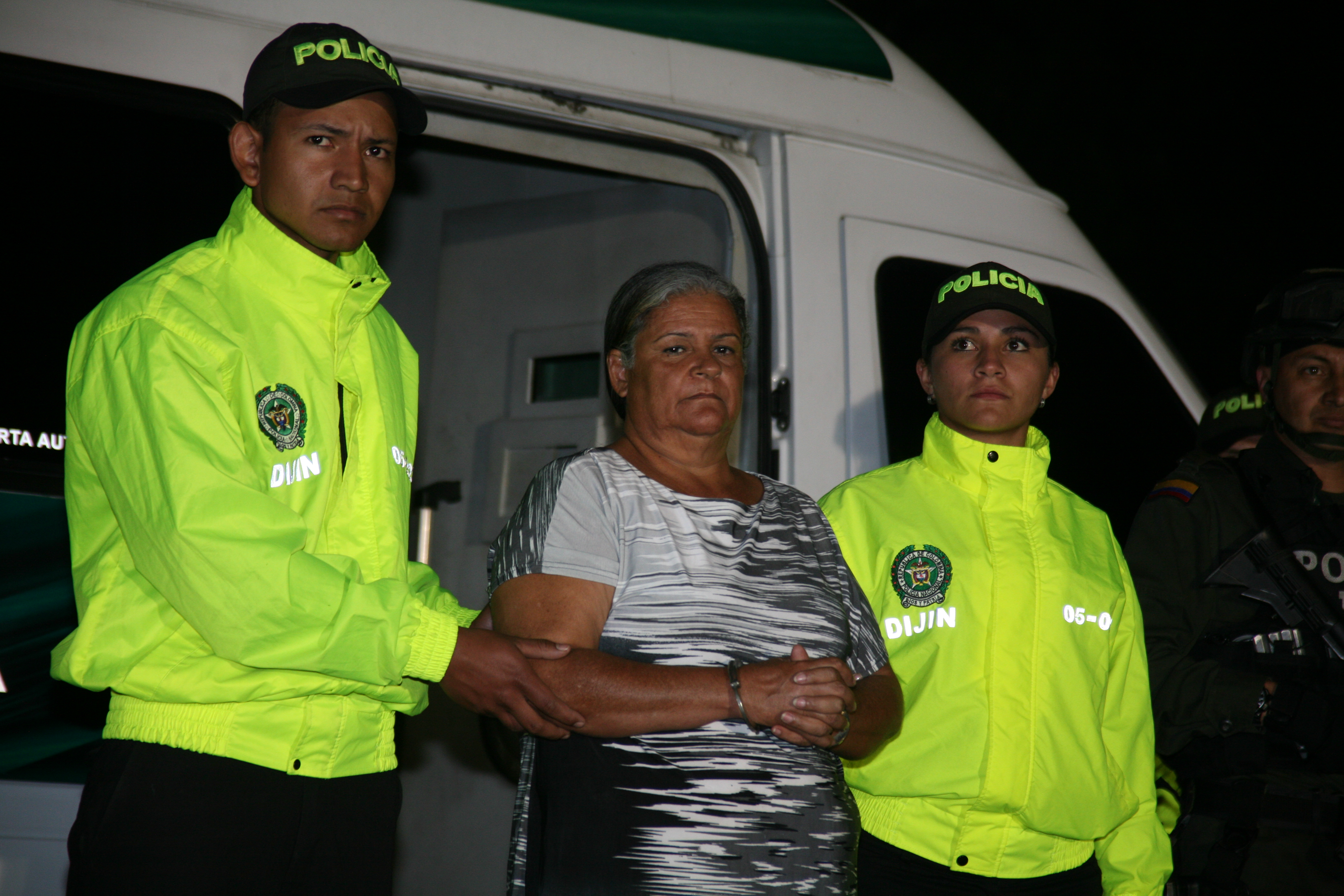 Sor Teresa Gómez tiene una condena de 40 años por el crimen de una líder reclamante de tierras.